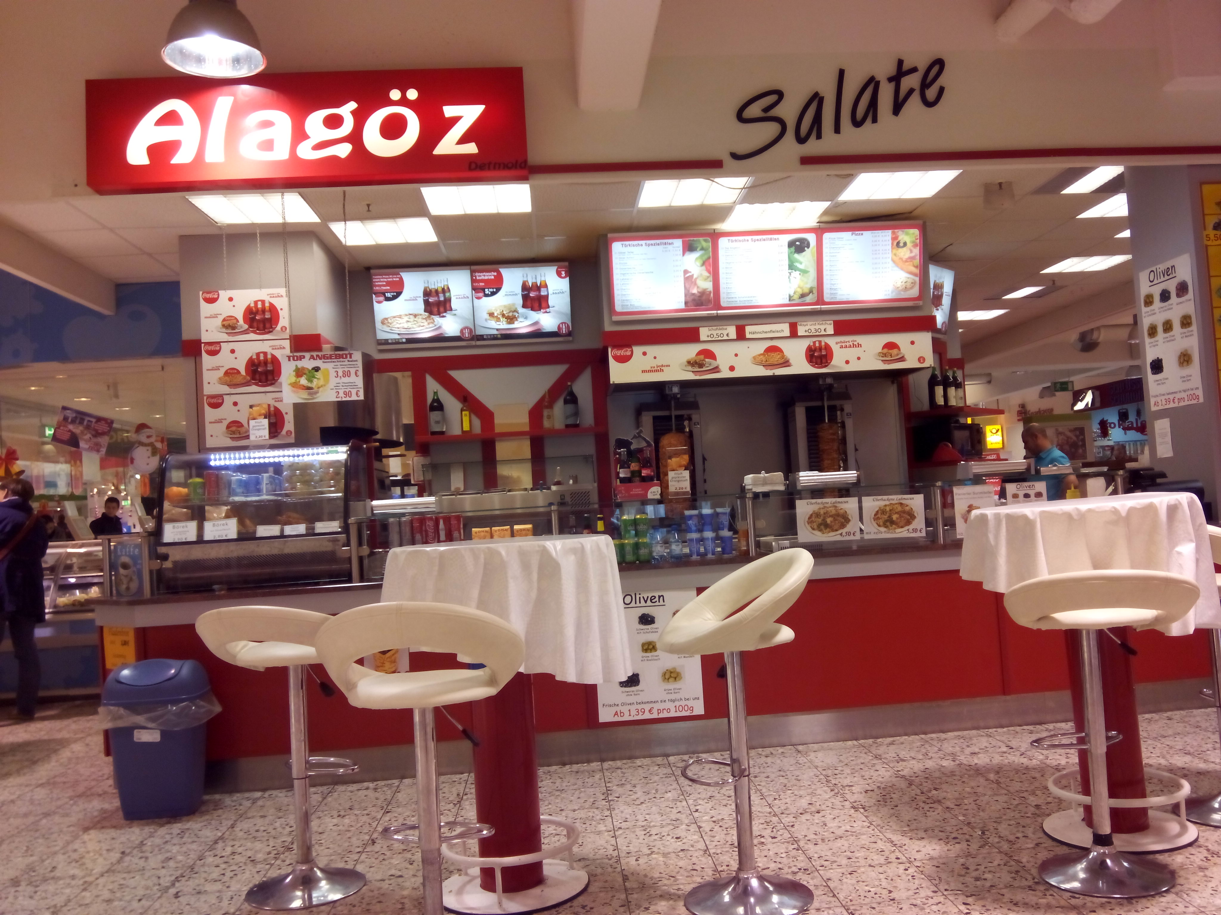 Alagöz im Real-Markt Detmold